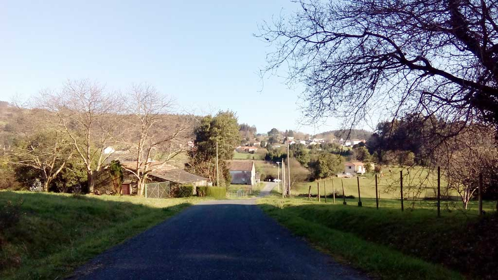 Vista do Río da Lousa, Sedes.